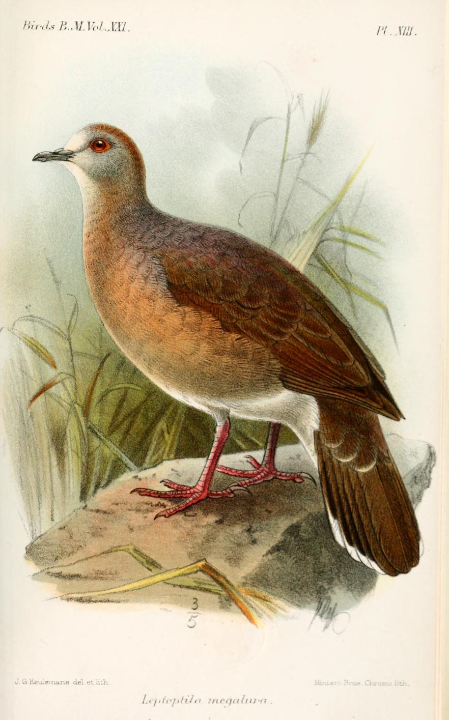 Leptoptila megalura = Leptotila megalura, White-faced Dove